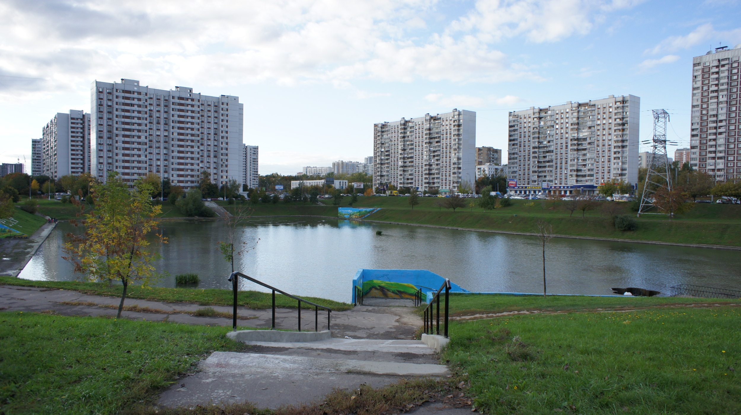 Пруд-отстойник на реке Чертановке